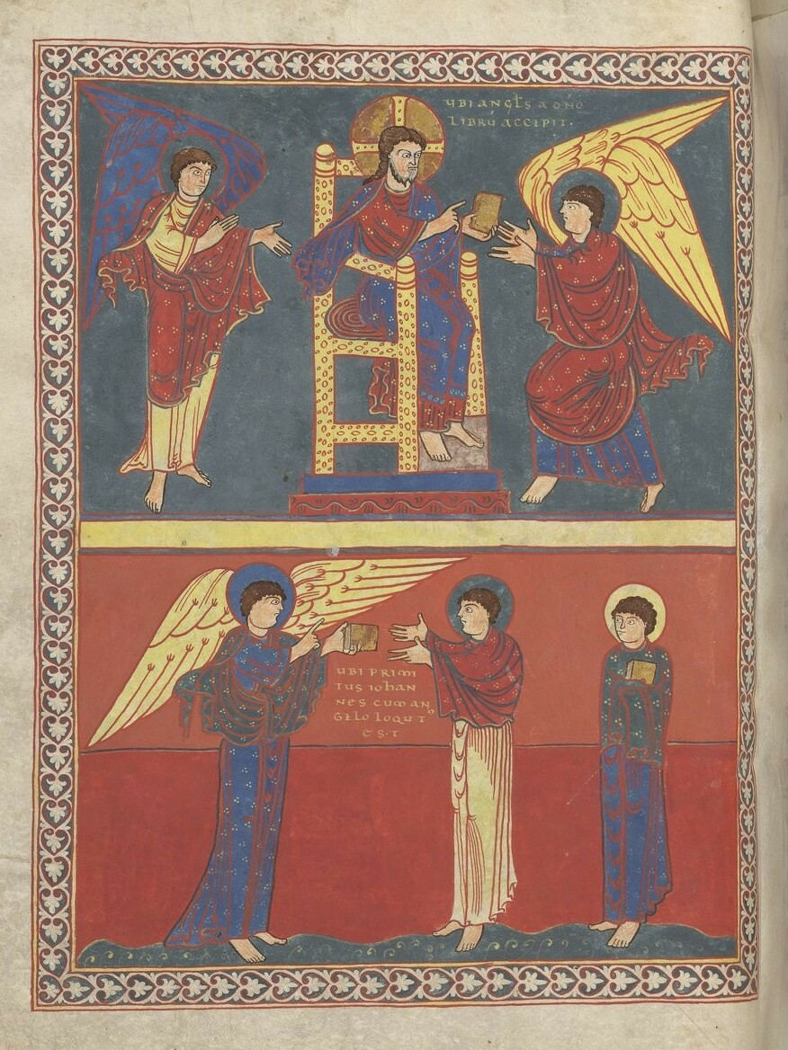 Eluminure Apocalypse de Saint Sever. fol. 26v.